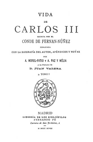 Portada del Tomo I de la Vida de Carlos III escrita por el Conde de Fernán-Núñez ; publicada con la biografía del autor, apéndices y notas por A. Morel-Fatio y A. Paz y Melia ; y un prólogo de Juan Valera la edición digital basada en la de Madrid, Librería de los Bibliófilos Fernando Fé, 1898